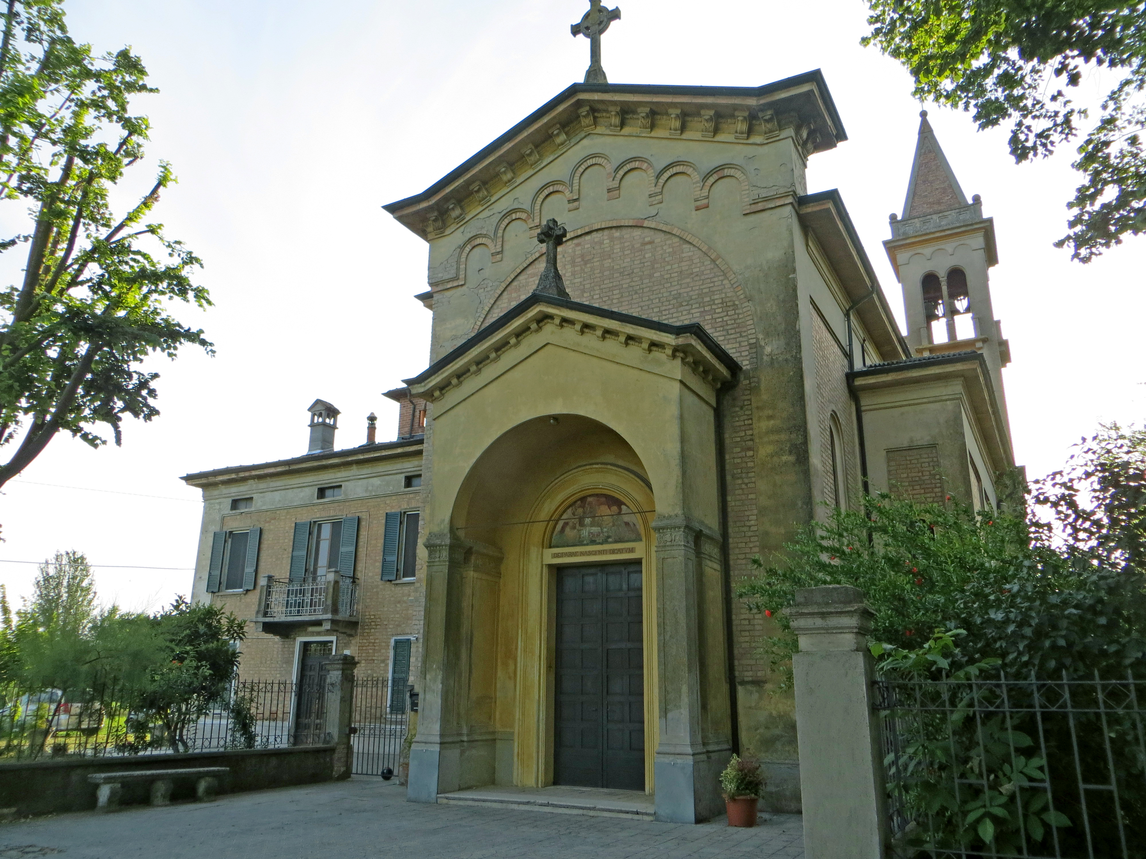 Chiesa della Natività di Maria Vergine (Baganzolino, Parma) - facciata e lato nord